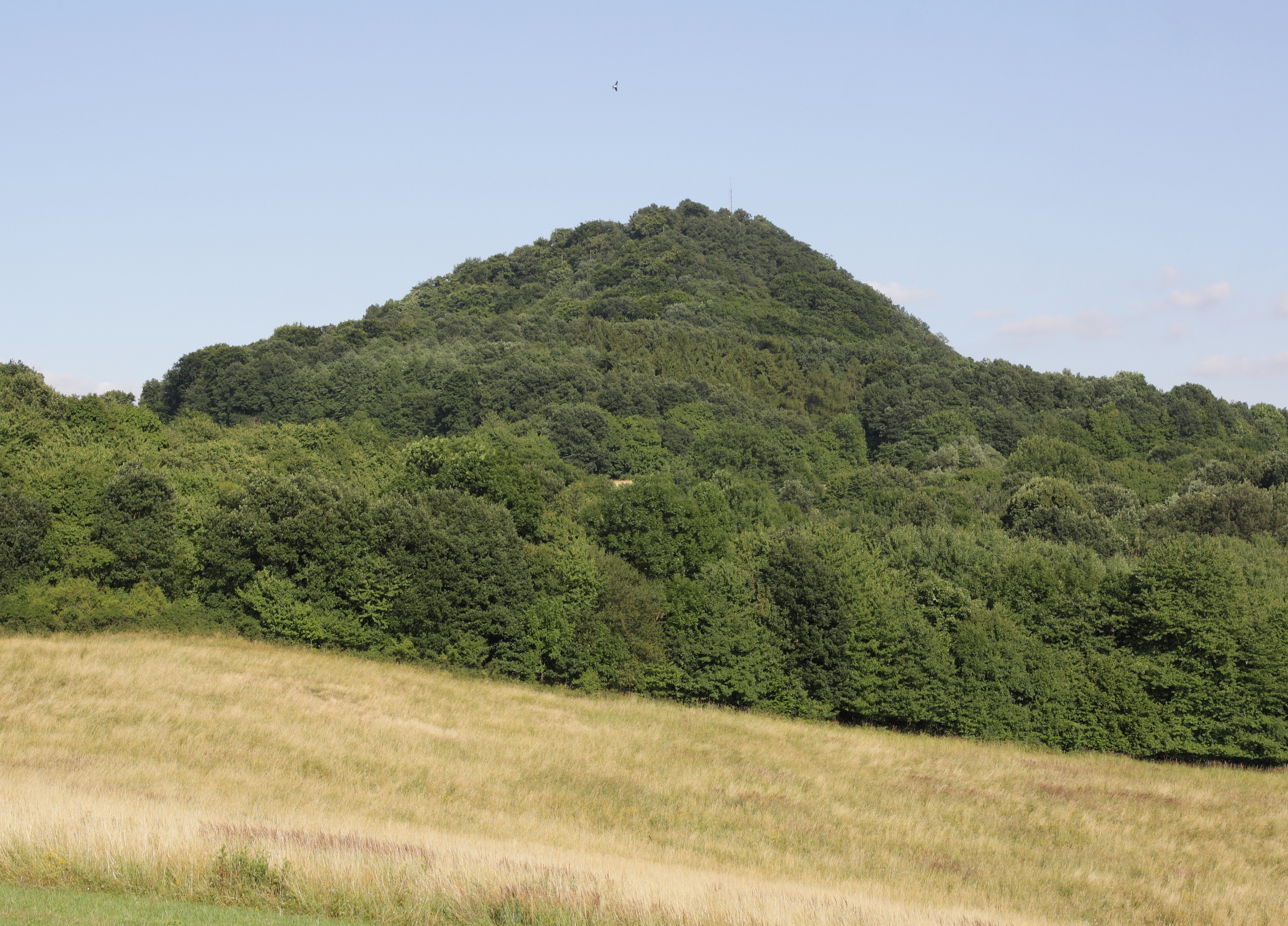 Vysoký Ostrý - pohled od východu